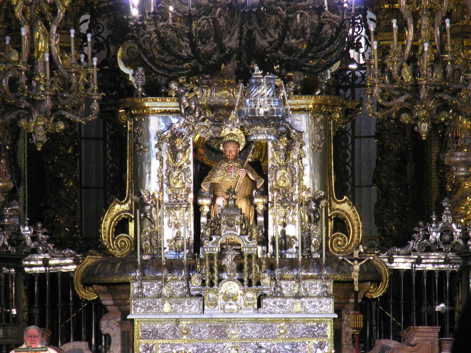 Catedral de Santiago de Compostela. Galicia Publish by= Luis Miguel Bugallo Sánchez. Self made